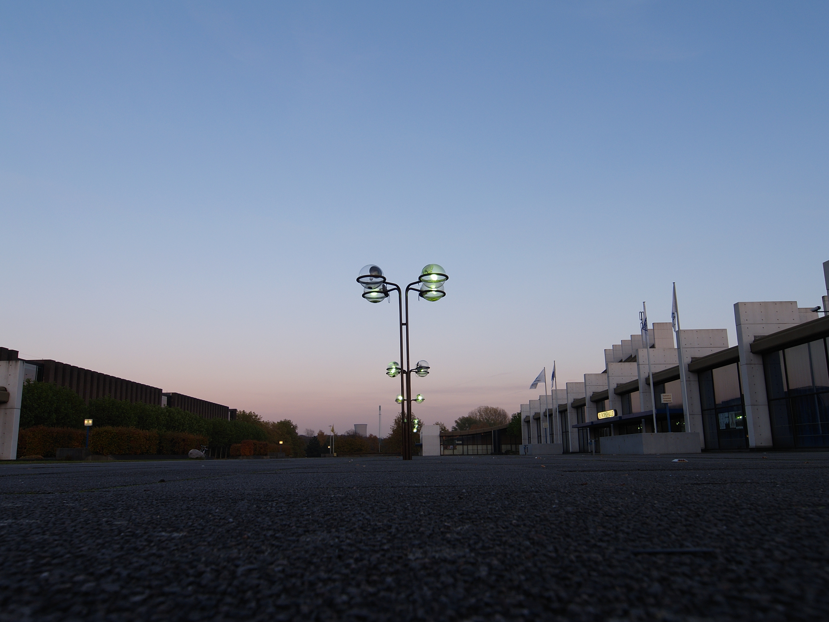 Europaplatz mit Rathaus (links) und Stadthalle (rechts) in Castrop-Rauxel, Architekt: Arne Jacobsen